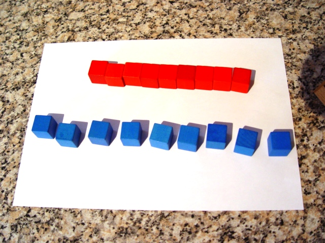 Objektmengen in linearer Anordnung beim Test auf Anzahlkonstanz.